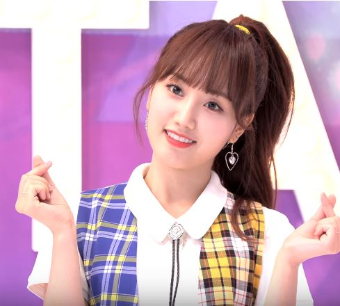 4일 오후 서울 마포구 상암동 tbs 오픈스튜디오에서 ‘tbs 팩트인스타 - ‘체리블렛’편 녹화가 펼쳐져 체리블렛 해윤이 포토타임을 갖고 있다.